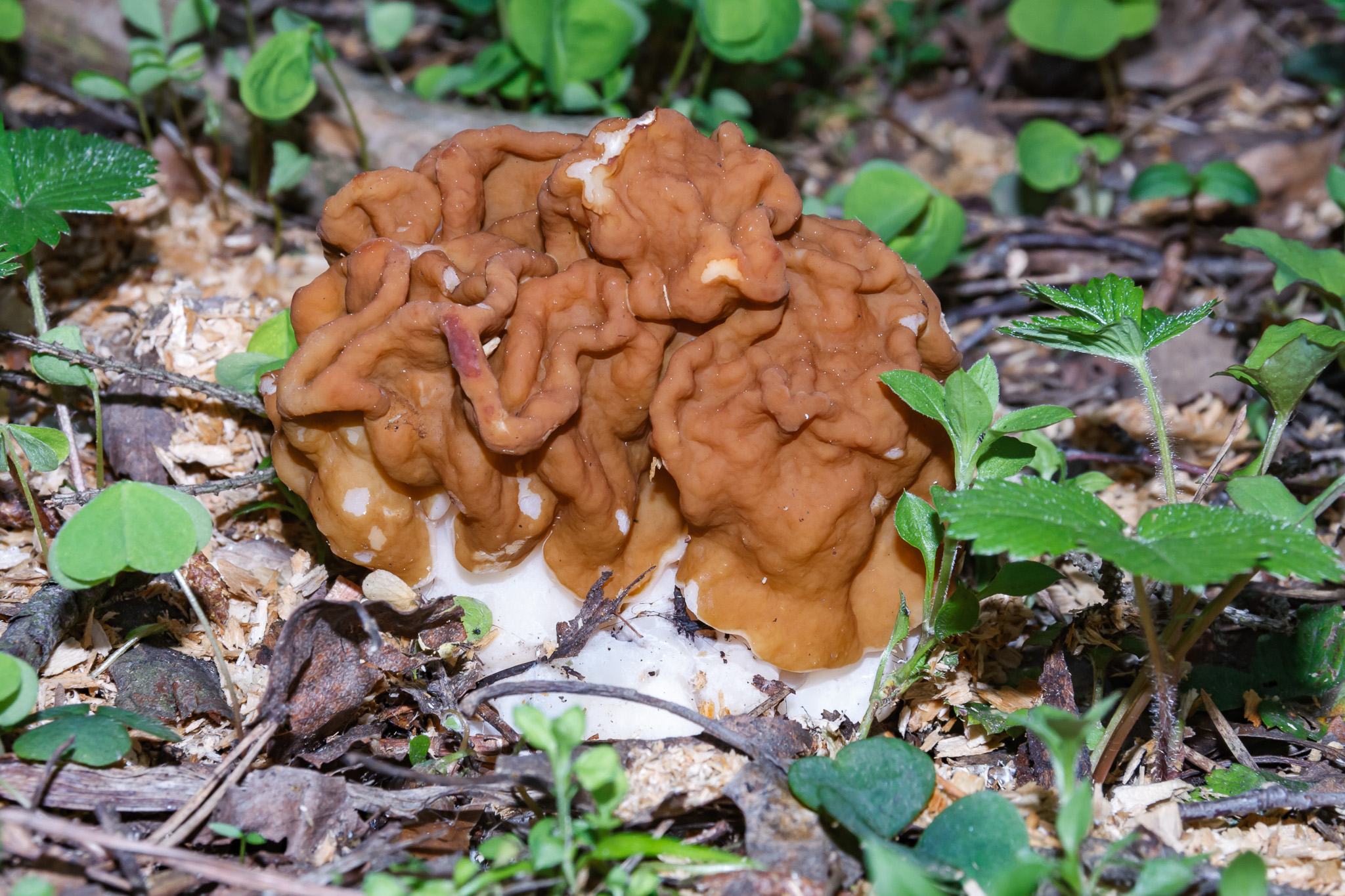 Строчок гигантский – вид сумчатых грибов рода Строчок. Широко распространён в Европе и Северной Америке. Плодовые тела появляются в апреле-мае. В русских источниках известен также как строчок большой или строчок исполинский. В США известен как снежный сморчок (англ. snow morel), снежный ложный сморчок (англ. snow false morel), мозг телёнка (англ. calf brain) и бычий нос (англ. bull nose)